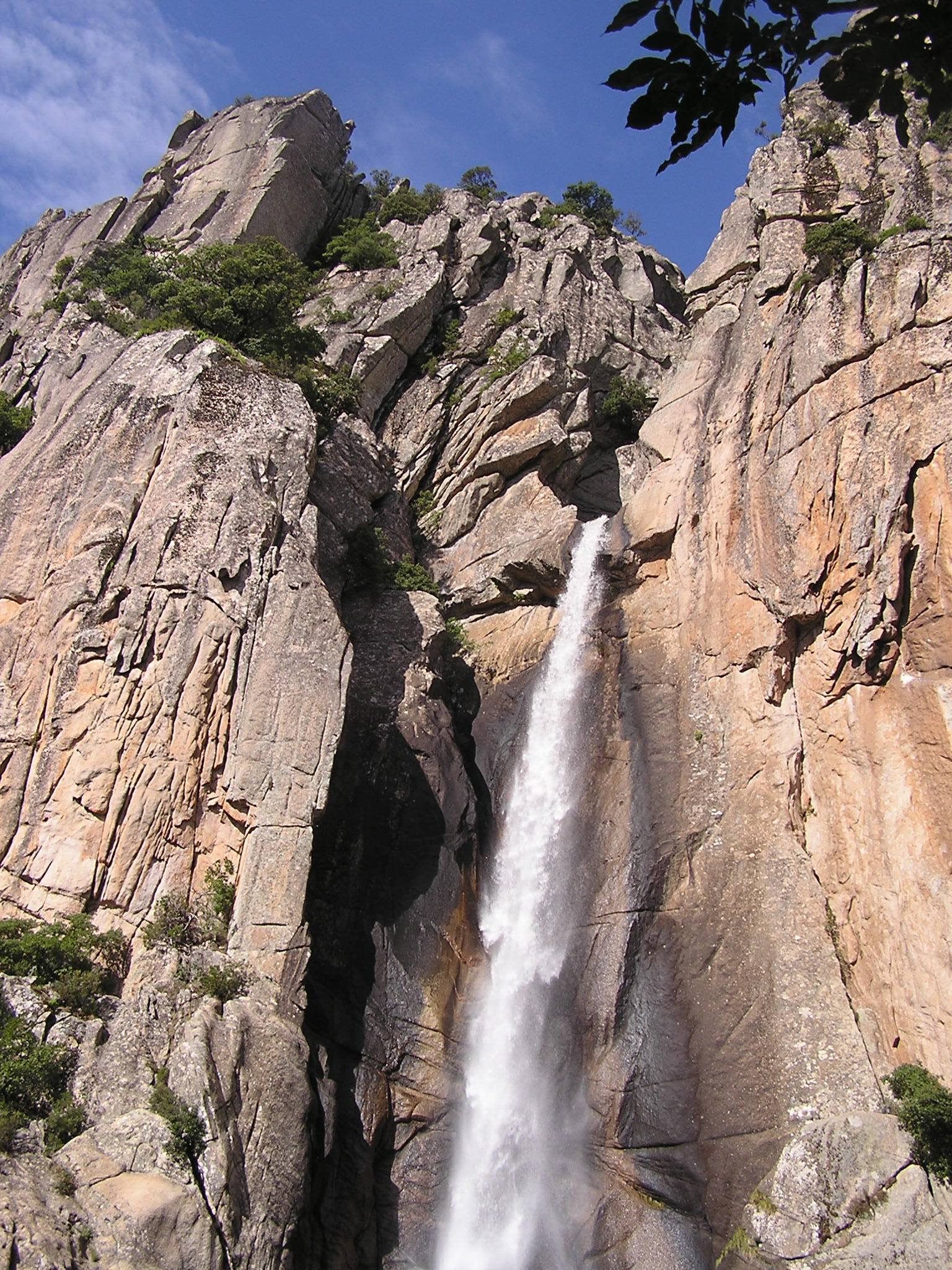 Cascade de Piscia di Gallo